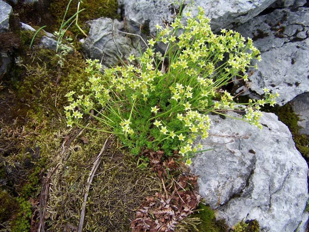 Saxifraga moschata